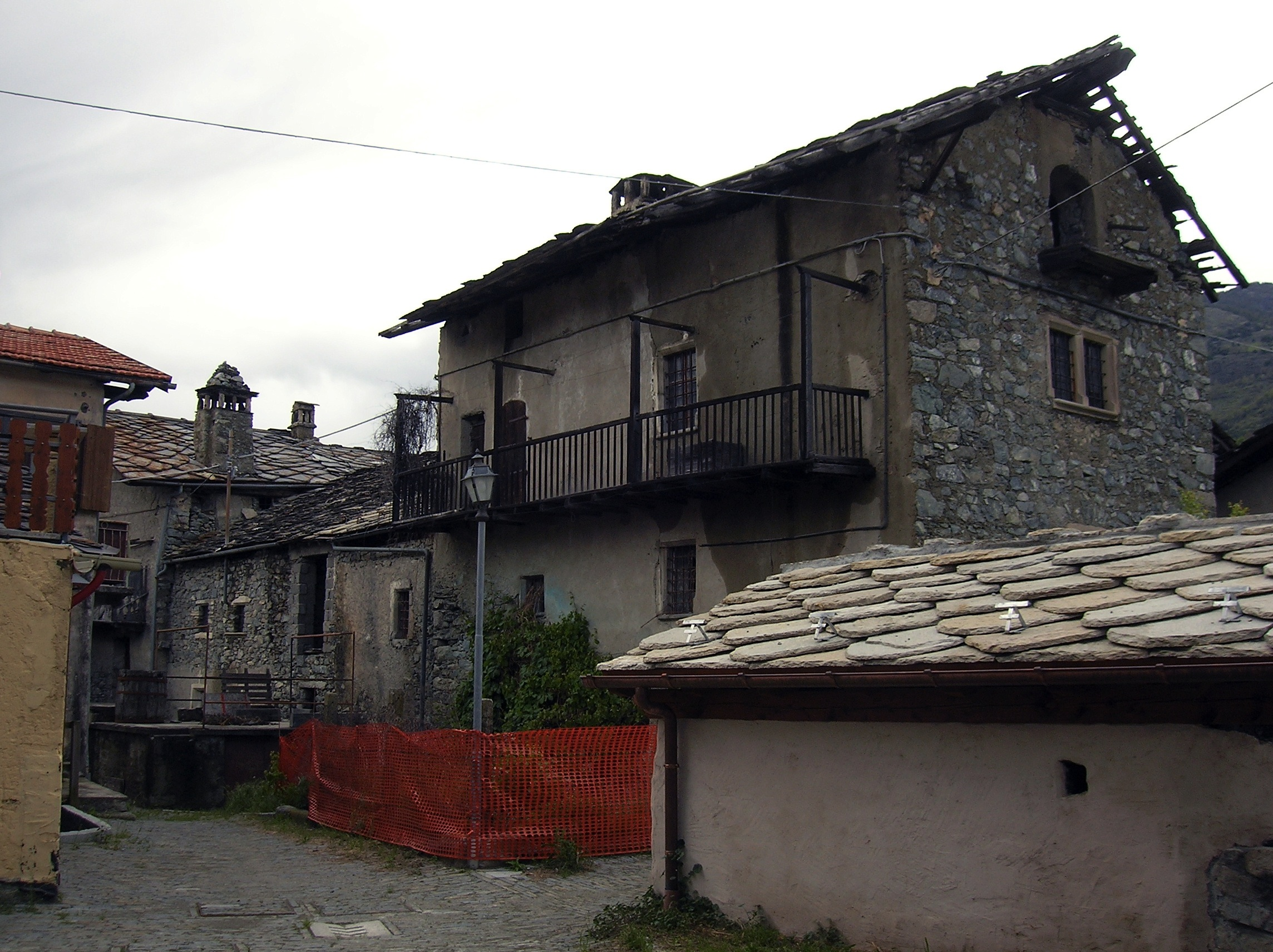 Maison Saluard detta anche Casaforte Marseiller. Località Marseiller, Verrayes, Valle d'Aosta, Italia.